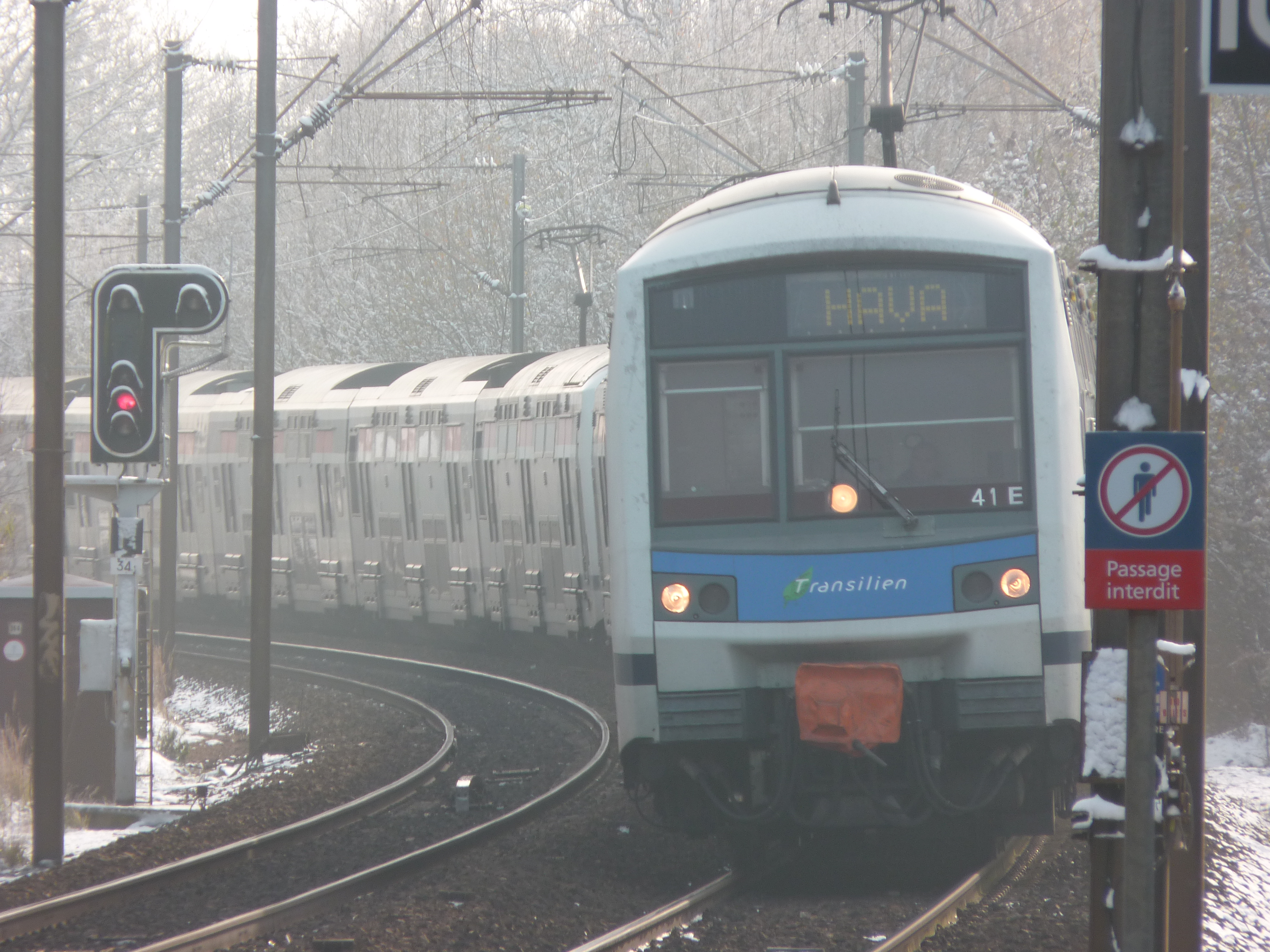 La rame 41 E du Z 22500 arrivant en gare d'Ozoir-la-Ferrière pour une mission HAVA en direction de Haussmann Saint Lazare.